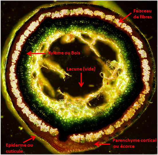 Coupe transversale de lin